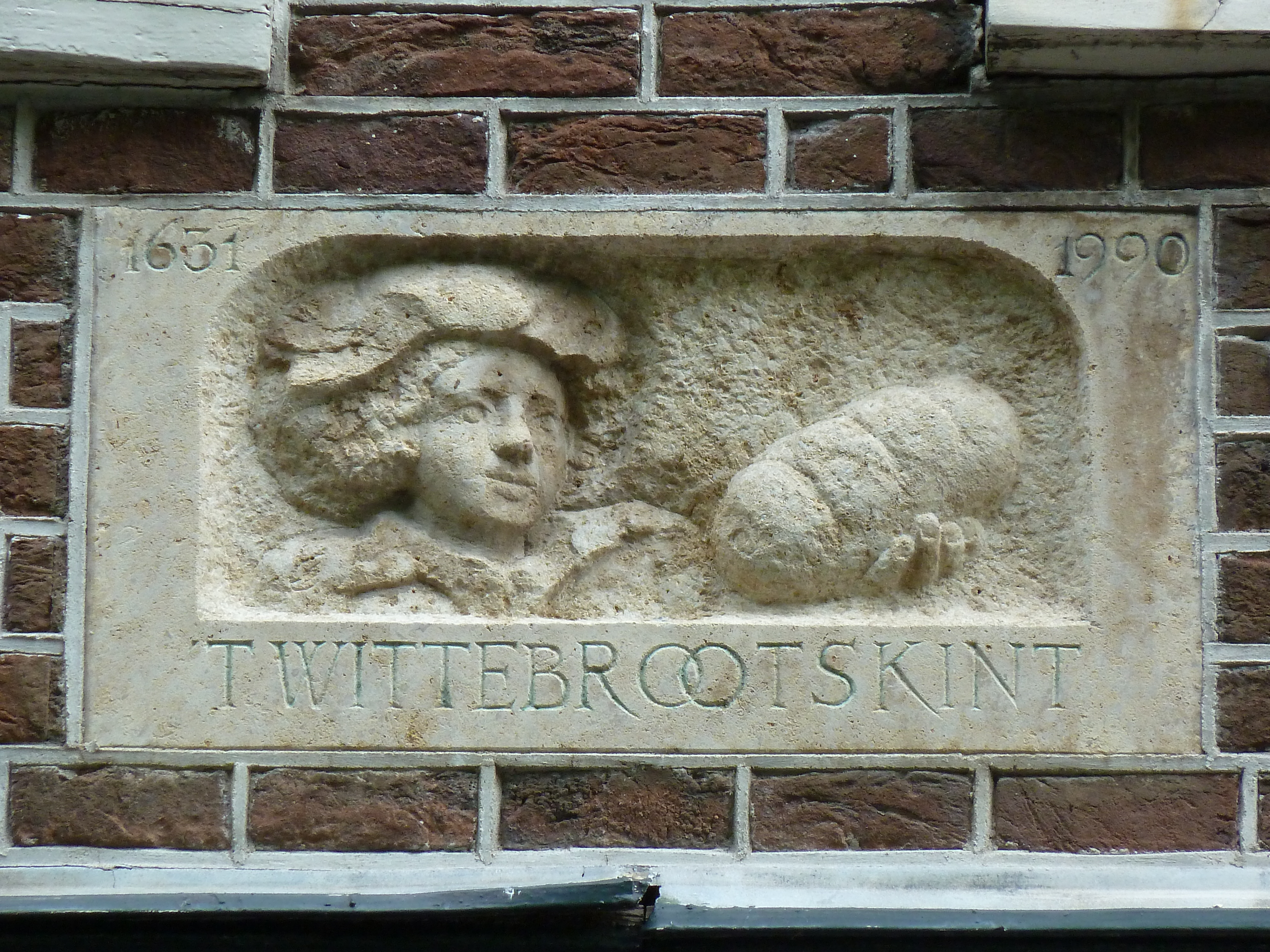 Gevelsteen aan huis 't Wittebrootskint, Oudegracht 276, Utrecht, NL, gemaakt door Evelyn Ebens, circa 1988